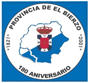 Pegatina conmemorativa del 180 aniversario de la Provincia del Vierzo realizada por el Partido de El Bierzo